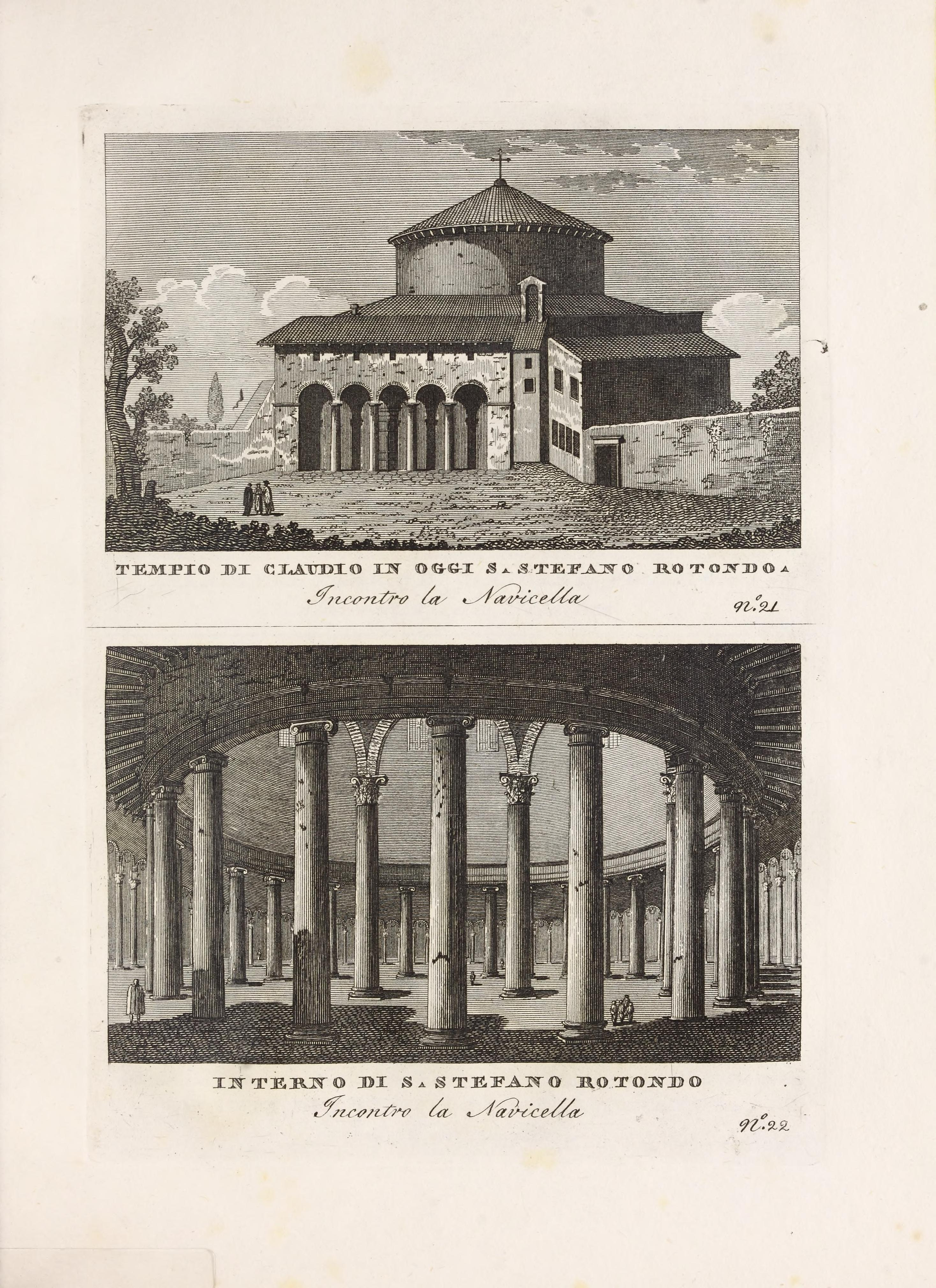 Illustrasjon hentet fra boken "Vedute antiche e moderne le piú interessanti della cittá di Roma" av ukjent forfatter og utgitt av Presso Venanzio Monaldini, Stefano Piale in Piazza di Spagna (it, [ca. 1820])